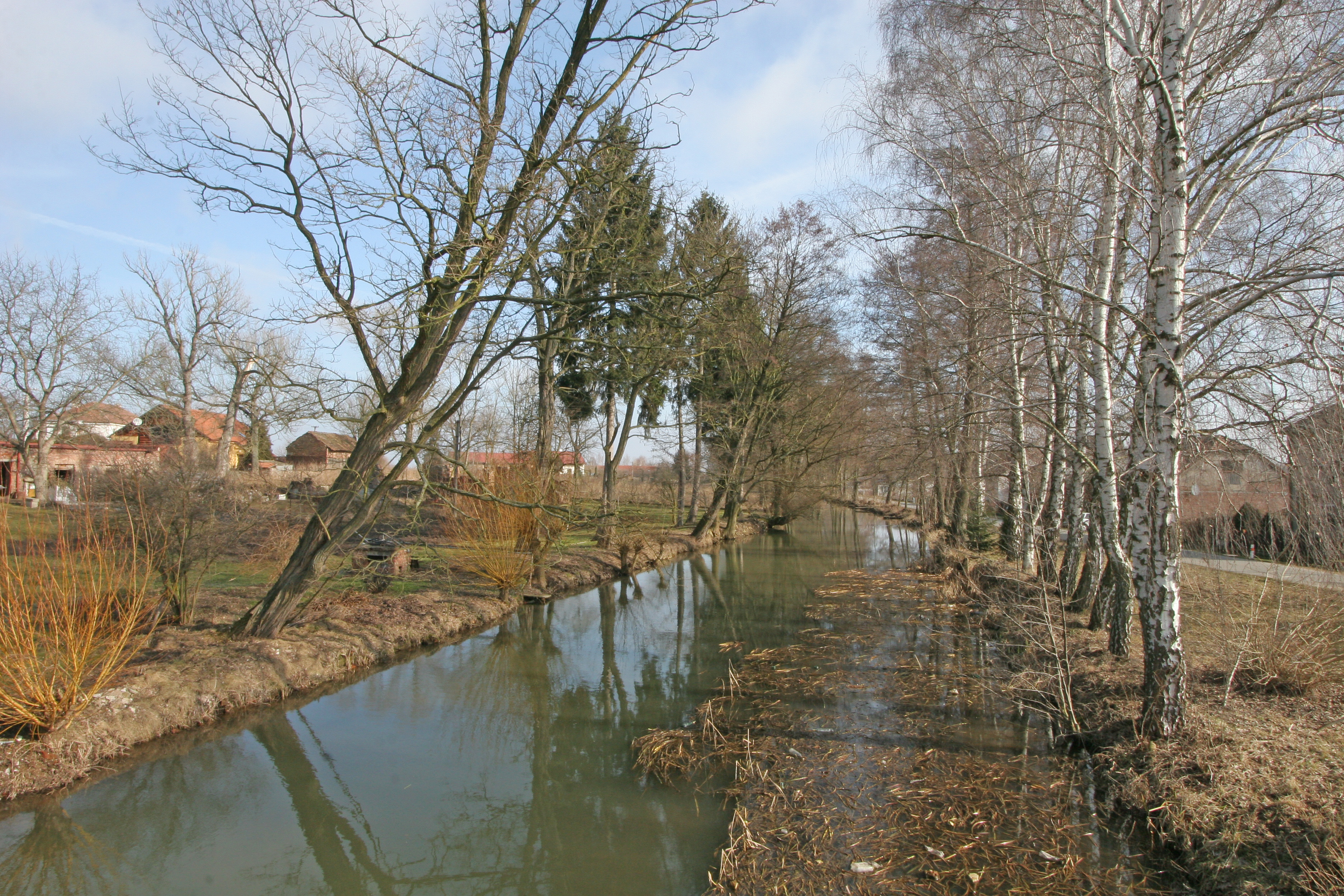 Podůlšany Opatovický kanál